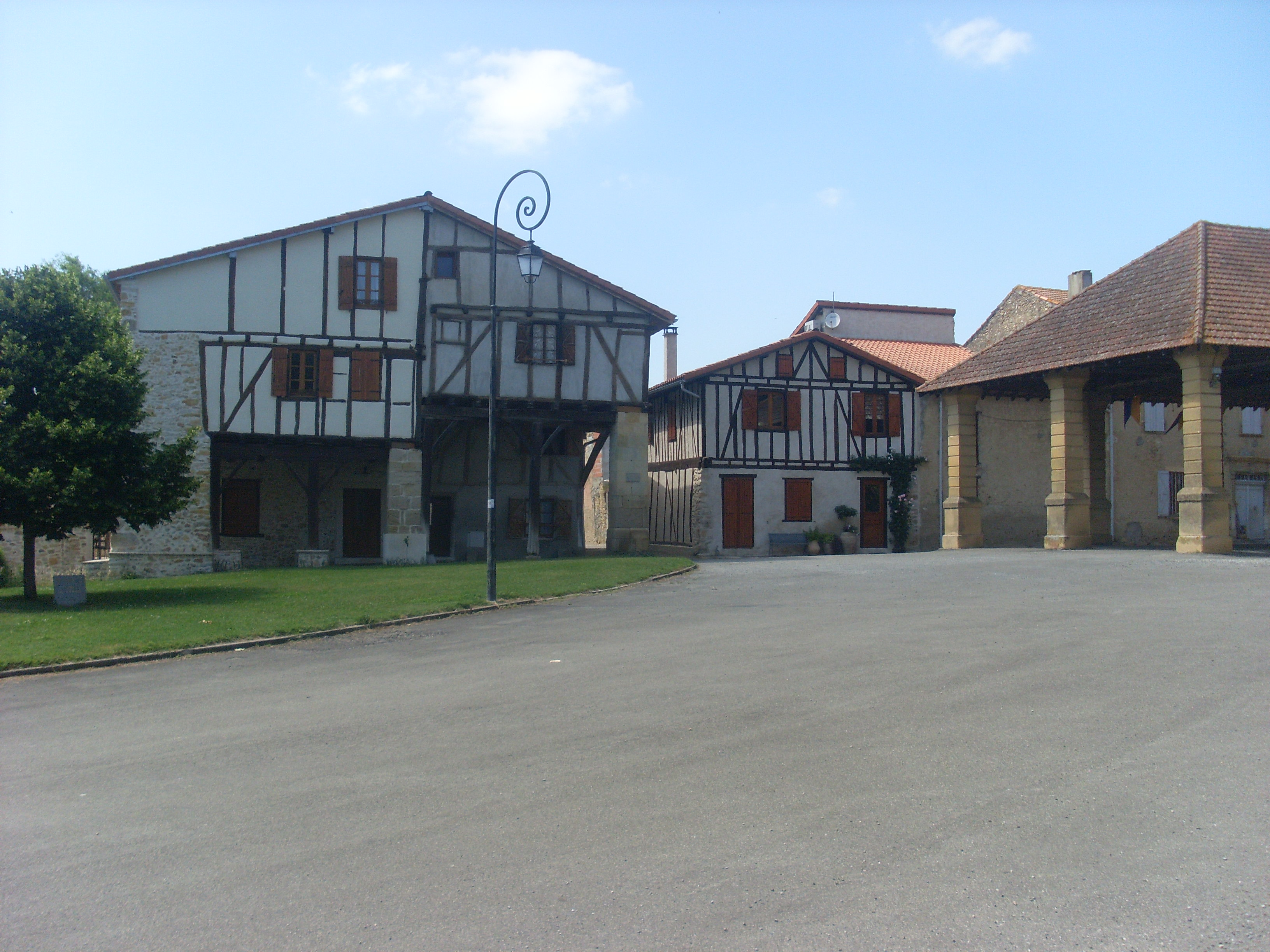 Le Plan